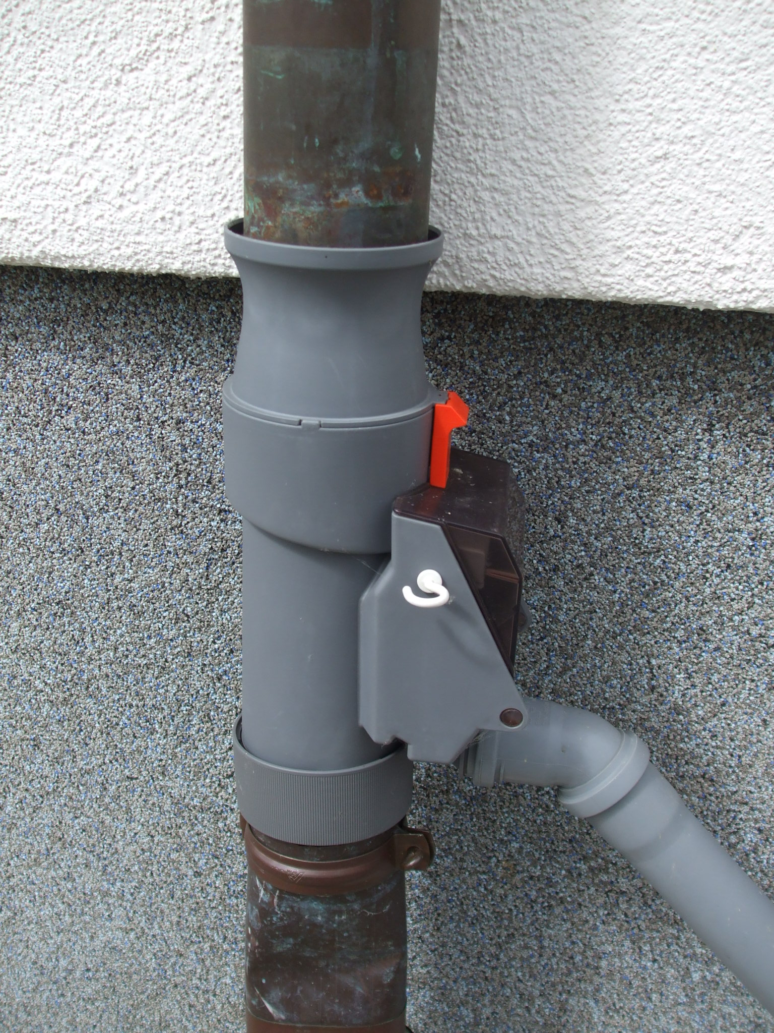 Regenwassersammler aus Kunststoff mit Weiche (Filter/Klappe) an einer Hauswand